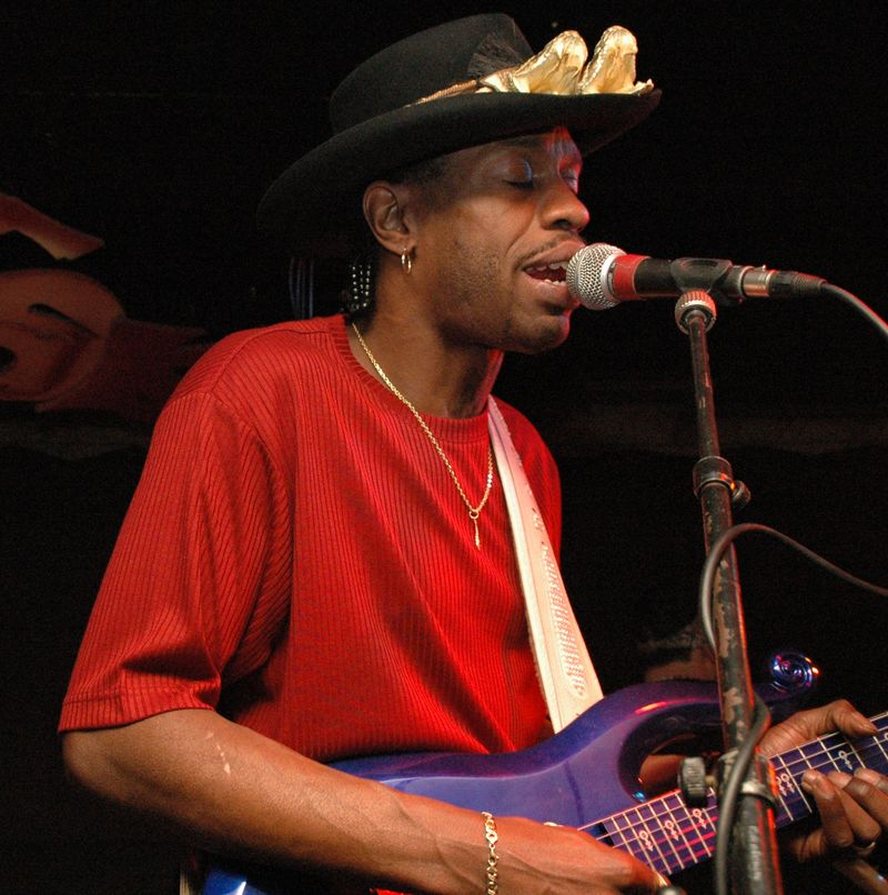 Bernhard Allison, live im "Fiasko", Kassel